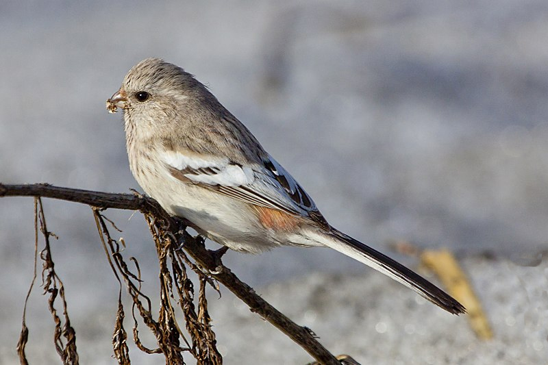 Урагус